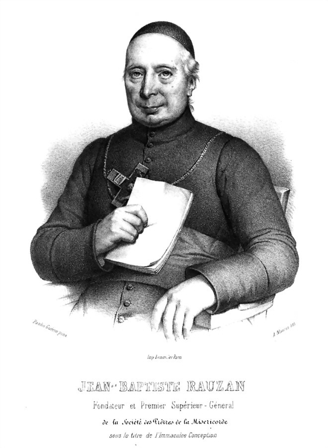 Portrait de l'abbé Rauzan, fondateur de la Société des Missions de France